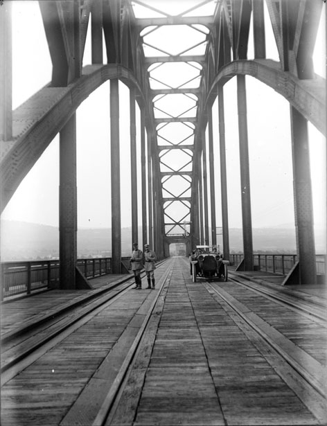 Fonds Trutat - Photographie ancienne Cote : TRU C 2920 Localisation : Fonds ancien (S 30) Original non communicable Titre : Vue des voies en perpective sur le pont de Bingen (Rhénanie-Palatinat) Auteur : Trutat, Eugène Rôle de l’auteur : Photographe Lieu de création : Bingen (Allemagne) Date de création : 20e siècle, 1e quart Mesures : : 9 x 12 cm Mot(s)-clé(s) : -- Pont ferroviaire -- Arche -- Pilier -- Rail -- Train -- Construction -- Métal -- Automobile -- Homme -- Rhénanie-Palatinat, Land de (Allemagne) -- Bingen (Allemagne) -- Bingerbrück (Allemagne) -- Allemagne -- Vallée du Haut-Rhin (Allemagne) -- 20e siècle, 1e quart Médium : Photographies -- Négatifs sur plaque de verre -- Noir et blanc -- Vues d'architecture Bibliothèque de Toulouse. Domaine public